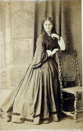 Laura Marx Lafargue (1845-1911)